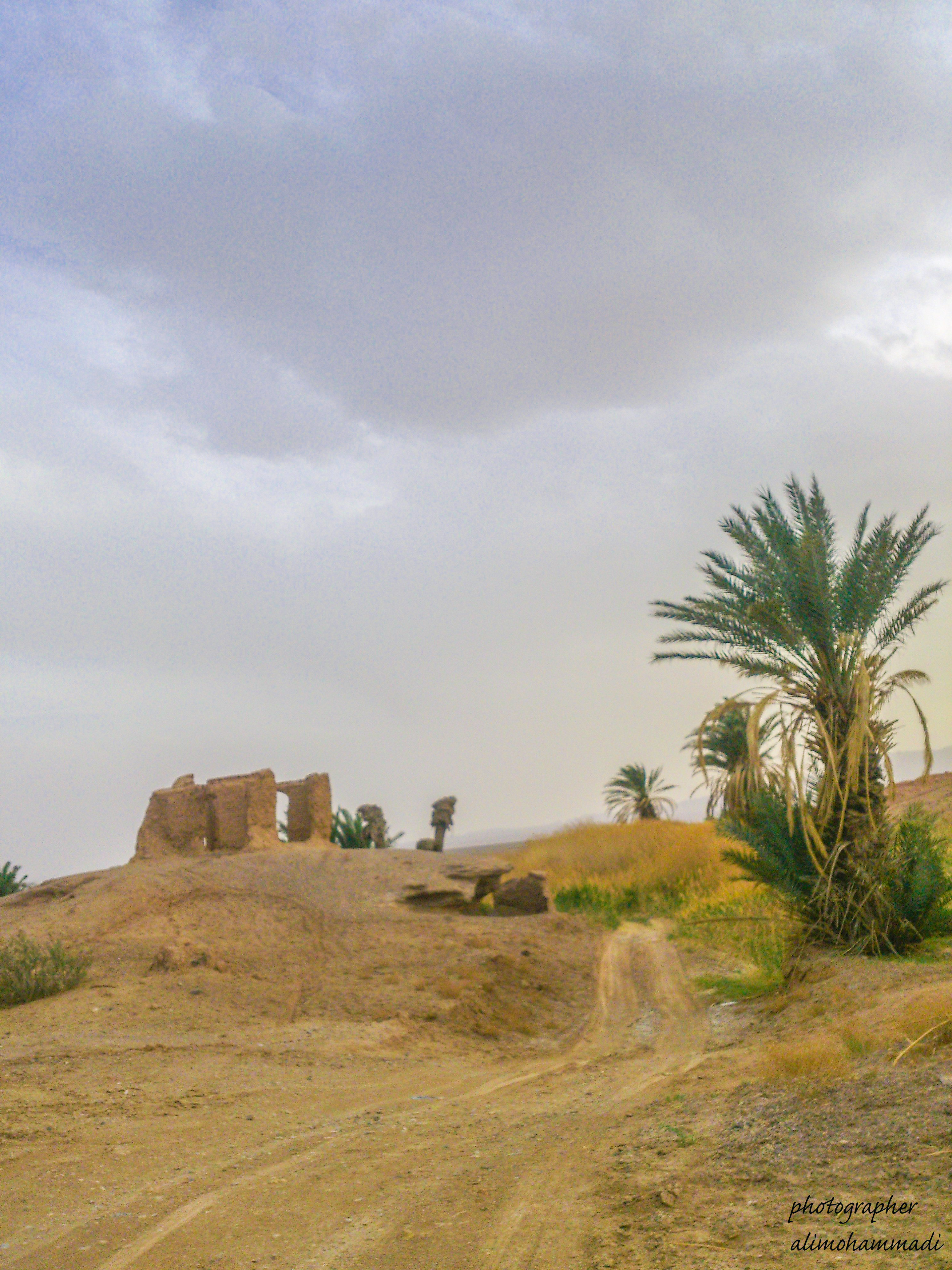 مزره ای در ساغند